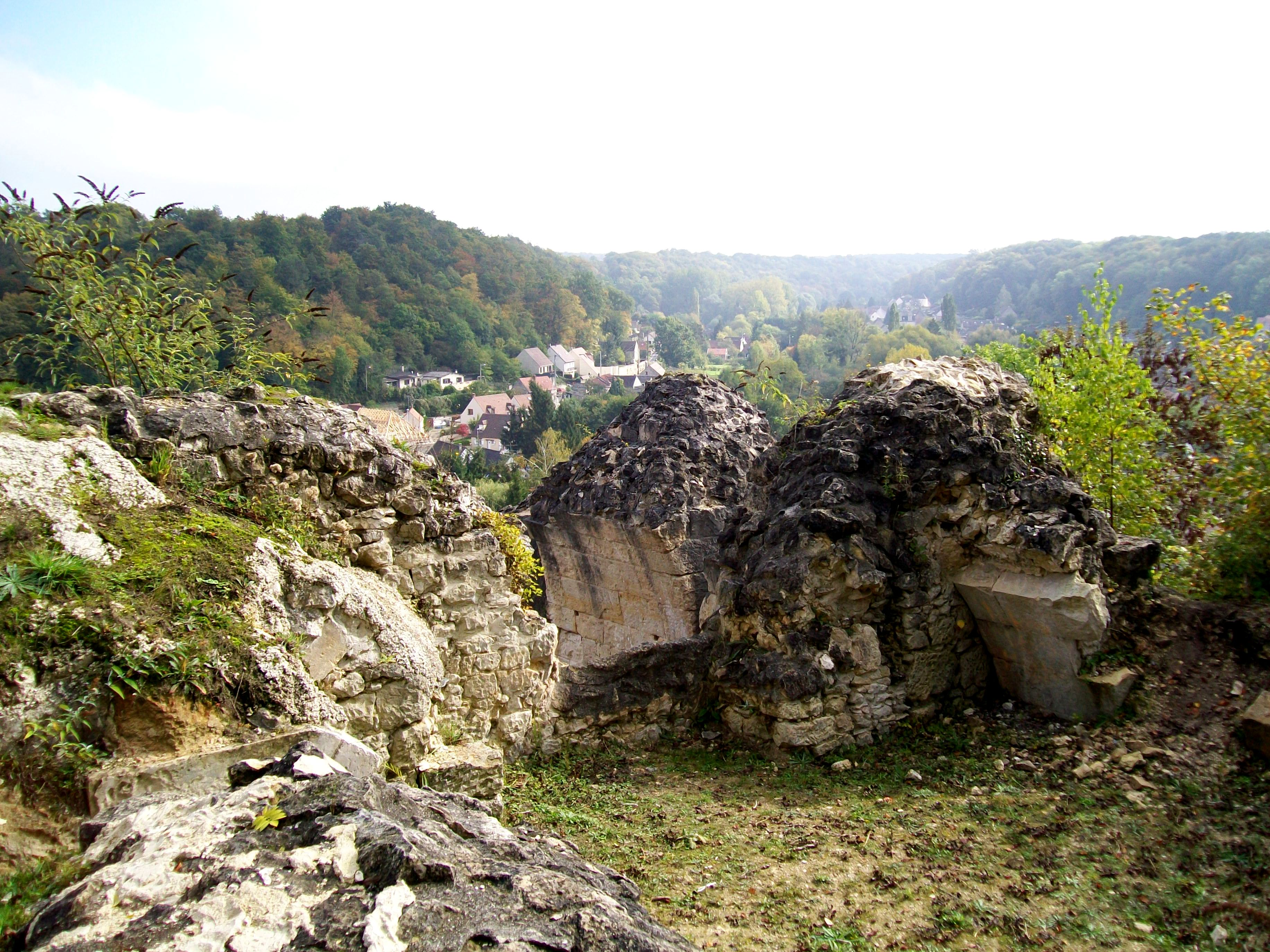 Vue depuis le premier étage, aile sud, sur Montlaville, quartier de Verneuil-en-Halatte.